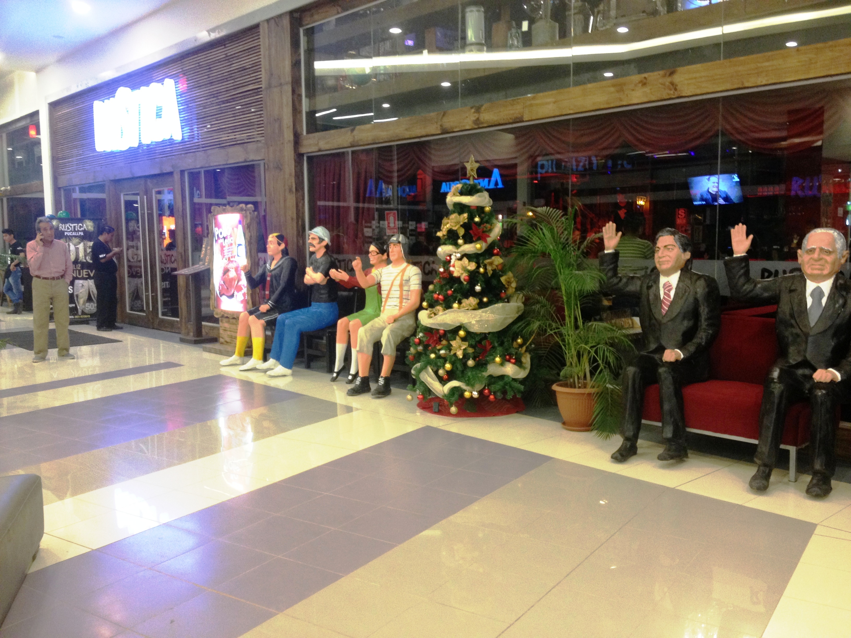 Entrada del local Rústica en el centro comercial de Real Plaza. En ella se muestra la imagen de la agrupación El Chavo. Warning: One or more elements in this image are protected by copyright Some parts of this file are not fully free but believed to be de minimis for this work. Derivatives of this file which focus more on the non-free element(s) may not qualify as de minimis and may be copyright violations. As a direct consequence it might be needed to review the copyright status if you crop the picture.